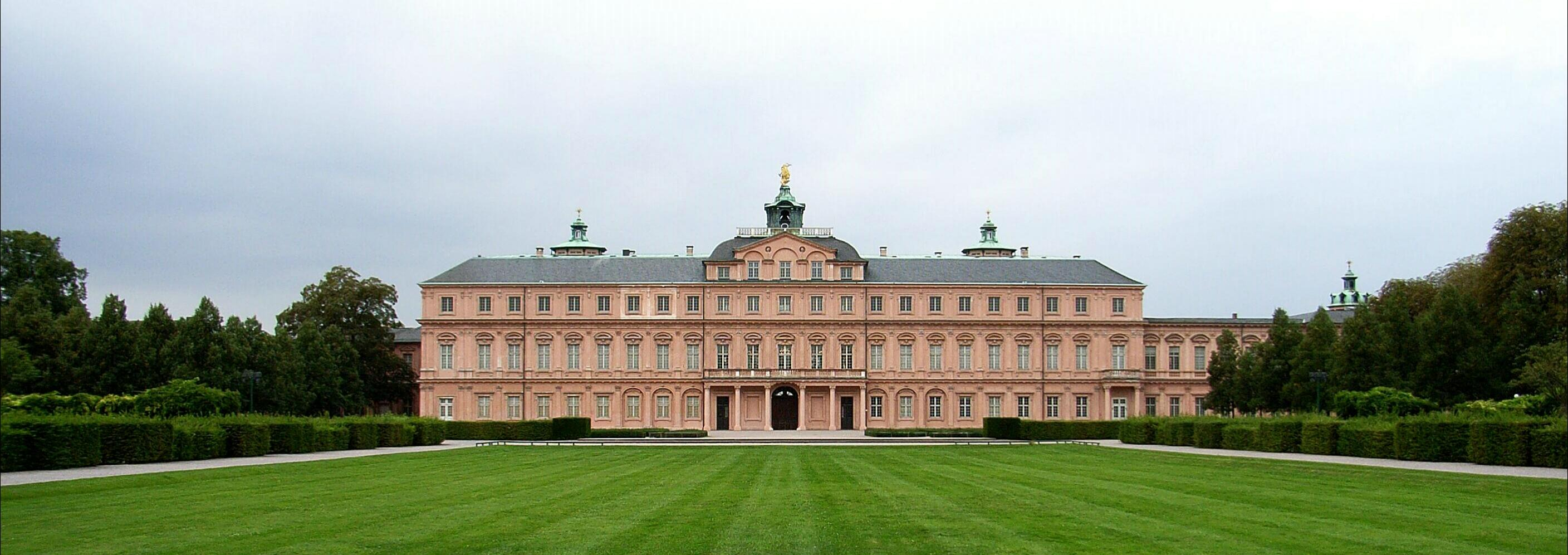 Dieses Bild zeigt das Rastatter Schloss vom Schlosspark.